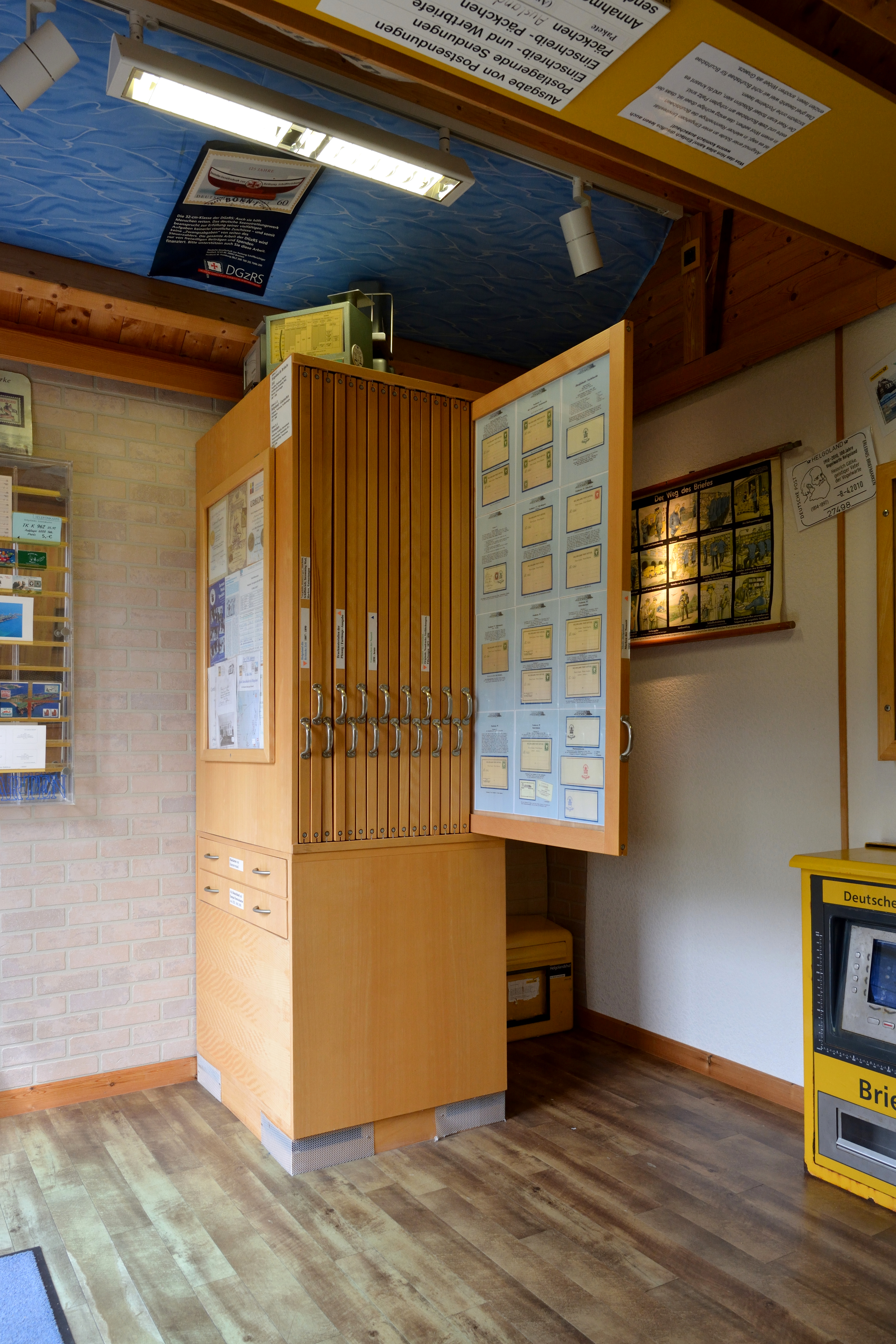 Bilder von Helgoland im Juli 2019Auf dem Museumshof in den nachgebauten Hummerbuden des Museum Helgoland: Das Post-Office, das Philateliemuseum Helgoland